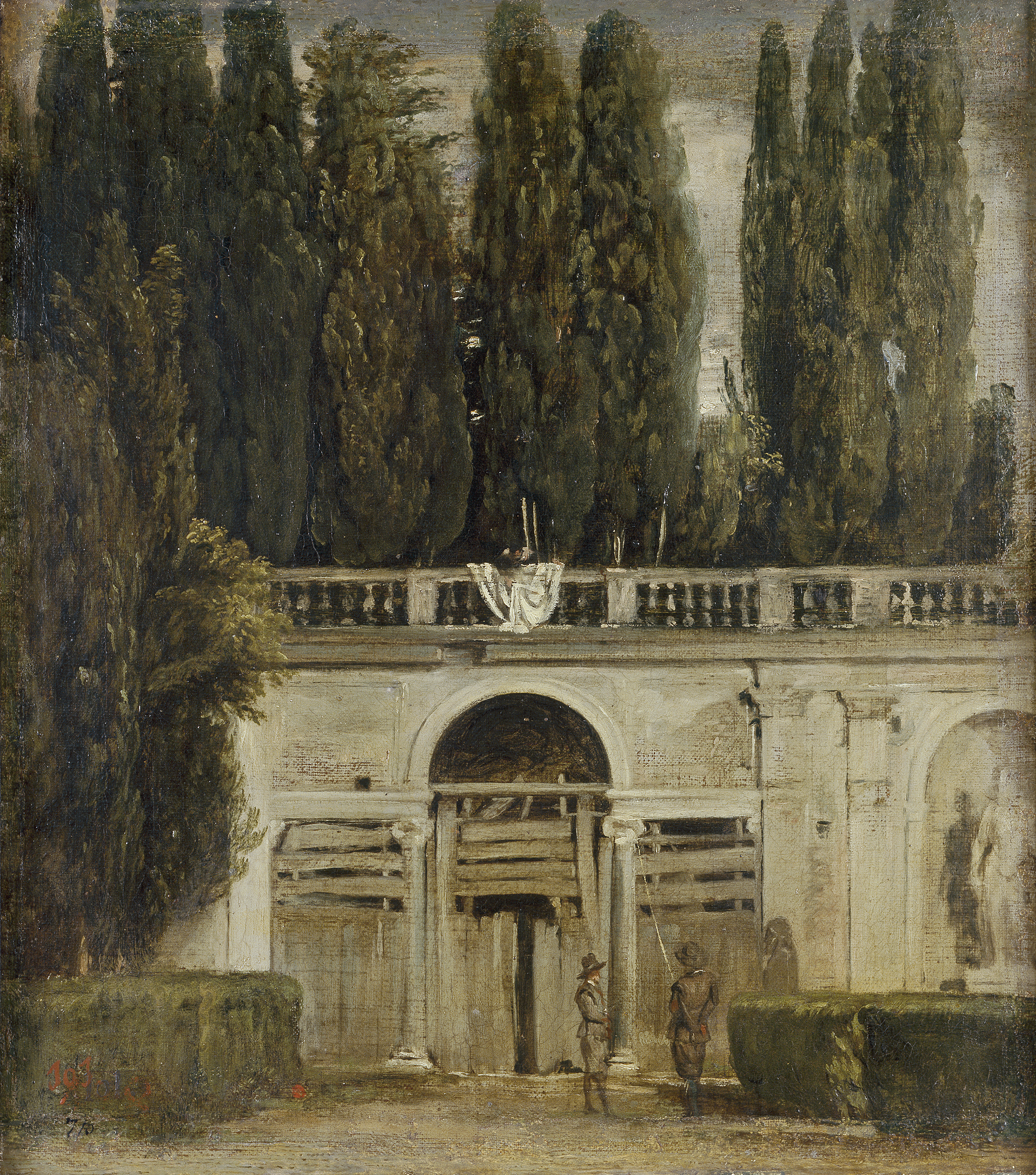 La obra representa el jardín de la Villa Médici de la ciudad de Roma, (Italia).